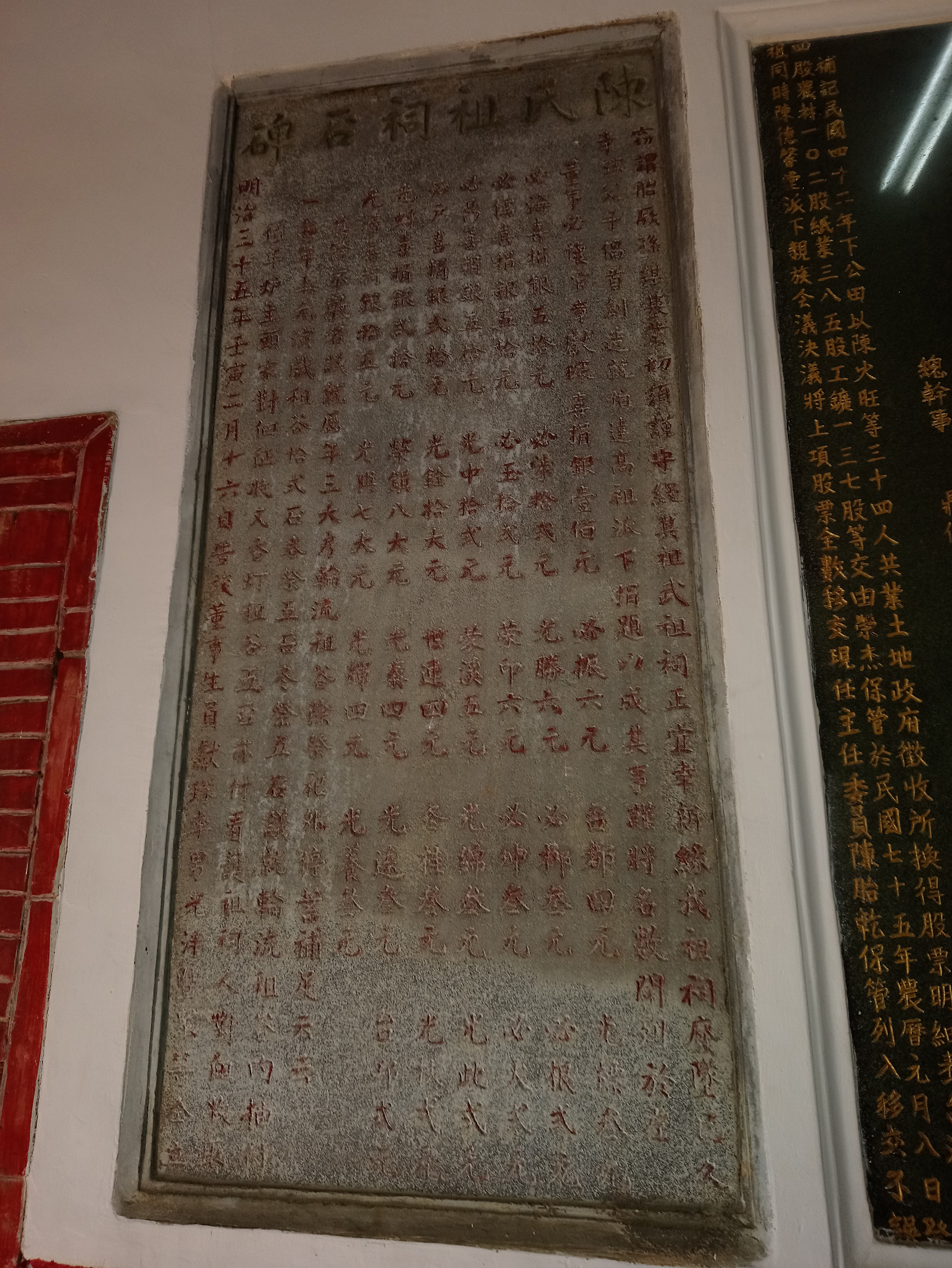 陳氏祖祠石碑,桃園市蘆竹區南崁地區山鼻里